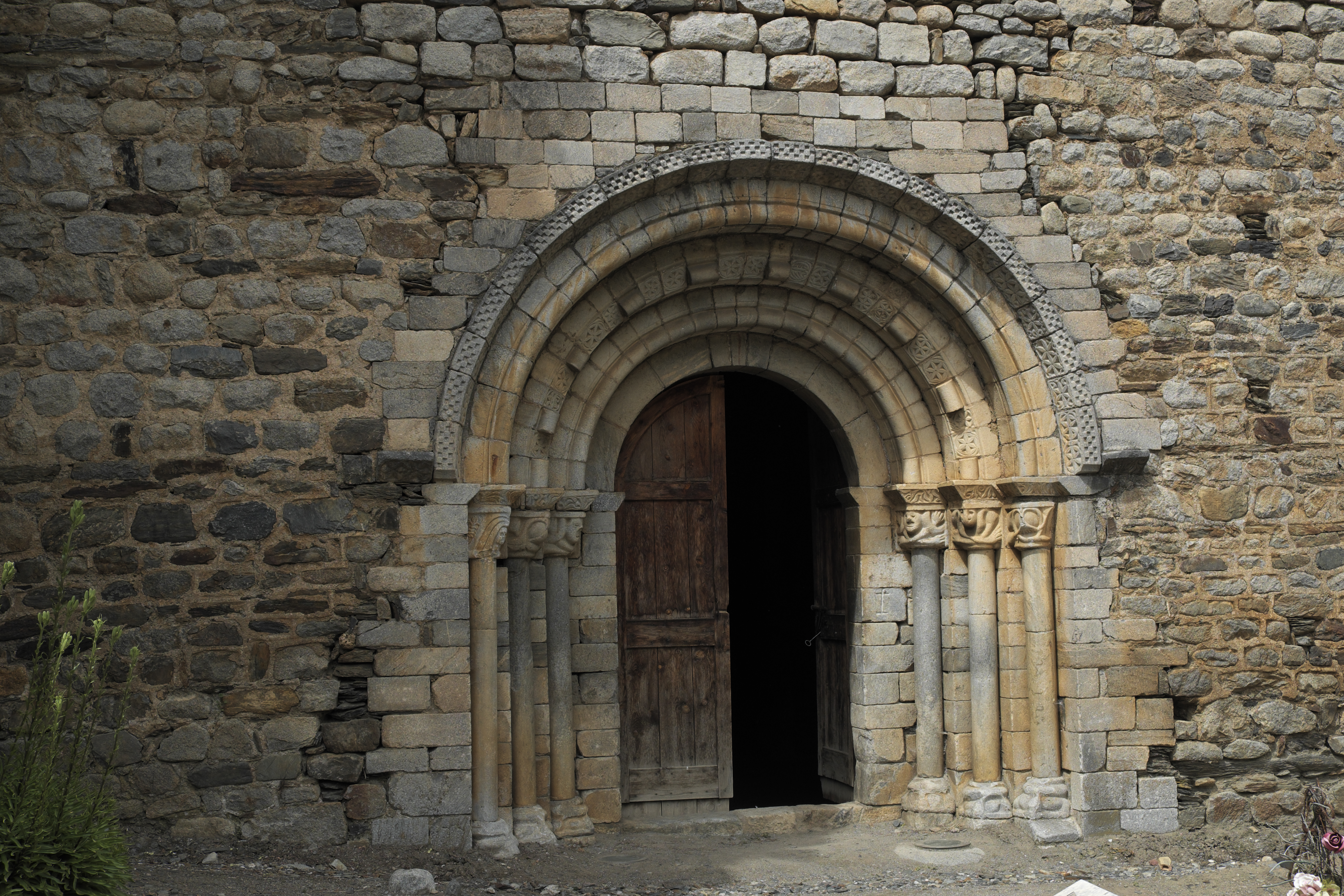 Kirche San Juan in Isil in der Provinz Lerida in Katalonien (Spanien), Portal